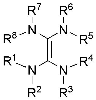 Ethylenetetraamine